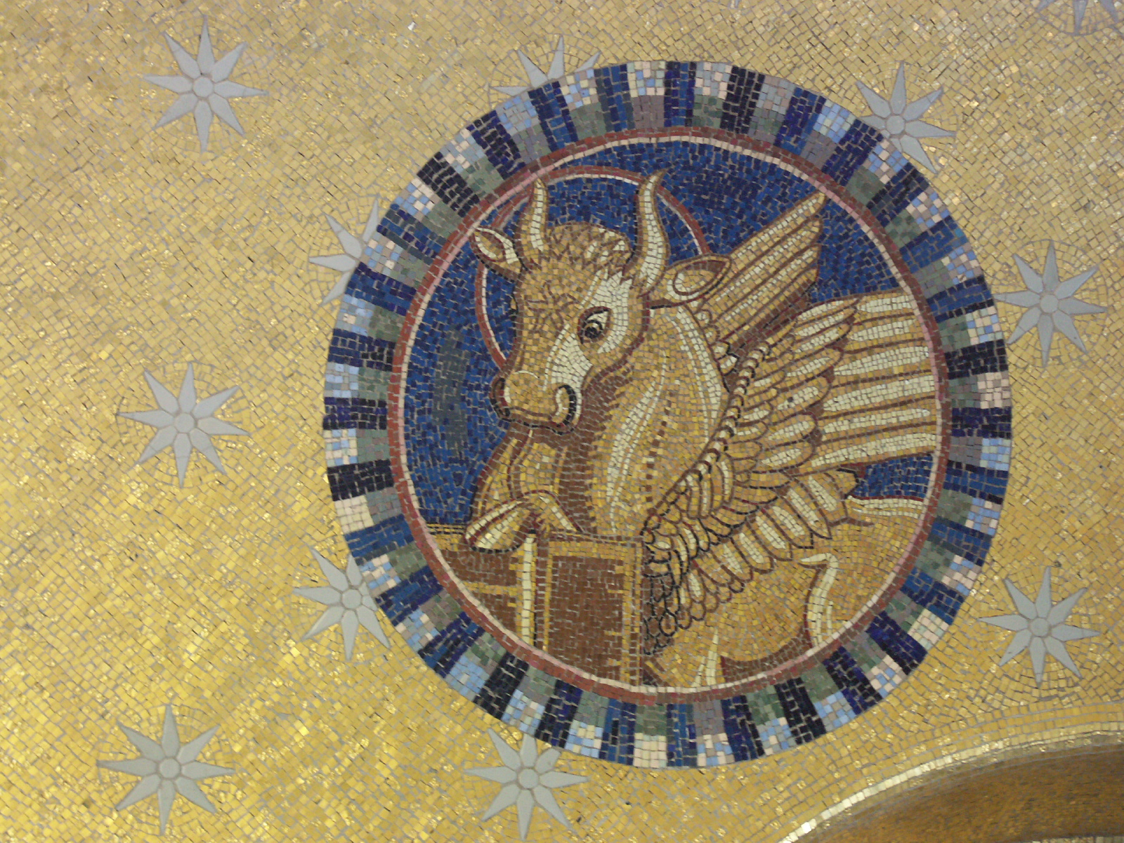 Mont Sainte-Odile, Alsace, France - Bull of Saint Luke